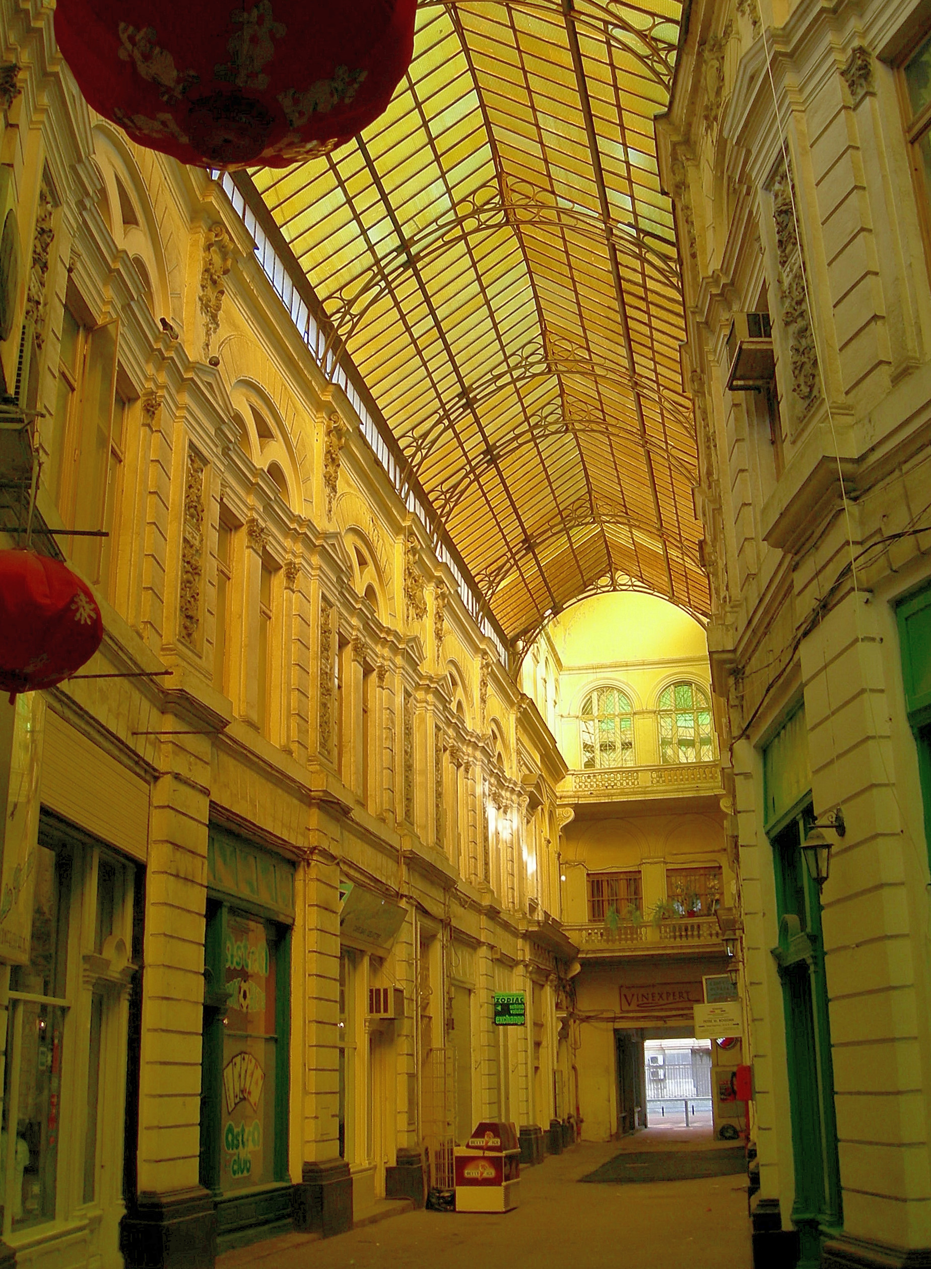 Pasajul Macca-Vilacrosse, Bucharest, Romania. Interior.